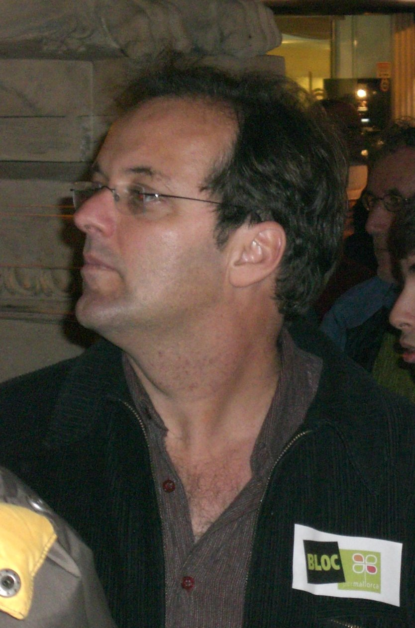 Miquel Àngel Llauger (Bloc per Mallorca)